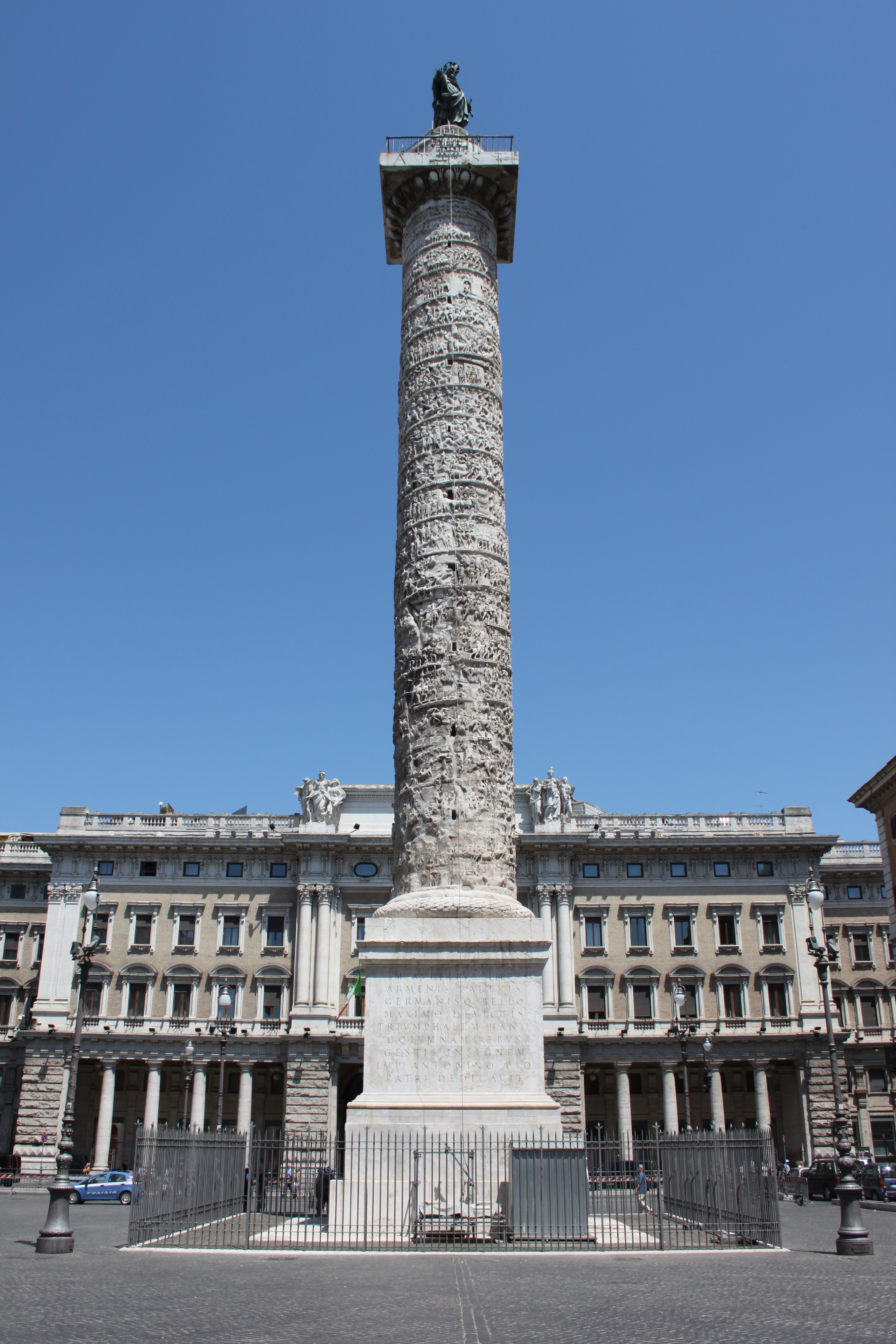 La Colonna di Marco Aurelio è un monumento di Roma, eretto tra il 176 e il 192 per celebrare, forse dopo la sua morte, le vittorie dell'imperatore romano Marco Aurelio (161-180) ottenute su Germani e Sarmati stanziati a nord del medio corso del Danubio durante le Guerre marcomanniche. La colonna, che era alta 29,617 metri (pari a 100 piedi romani; 42 metri se si considera anche la base), è ancora nella sua collocazione originale davanti a Palazzo Chigi e dà il nome alla piazza nella quale sorge, piazza Colonna. Il monumento, coperto di bassorilievi, è ispirato alla Colonna Traiana. Il fregio scultoreo che si arrotola a spirale intorno al fusto, se fosse svolto, supererebbe i 110 metri in lunghezza.